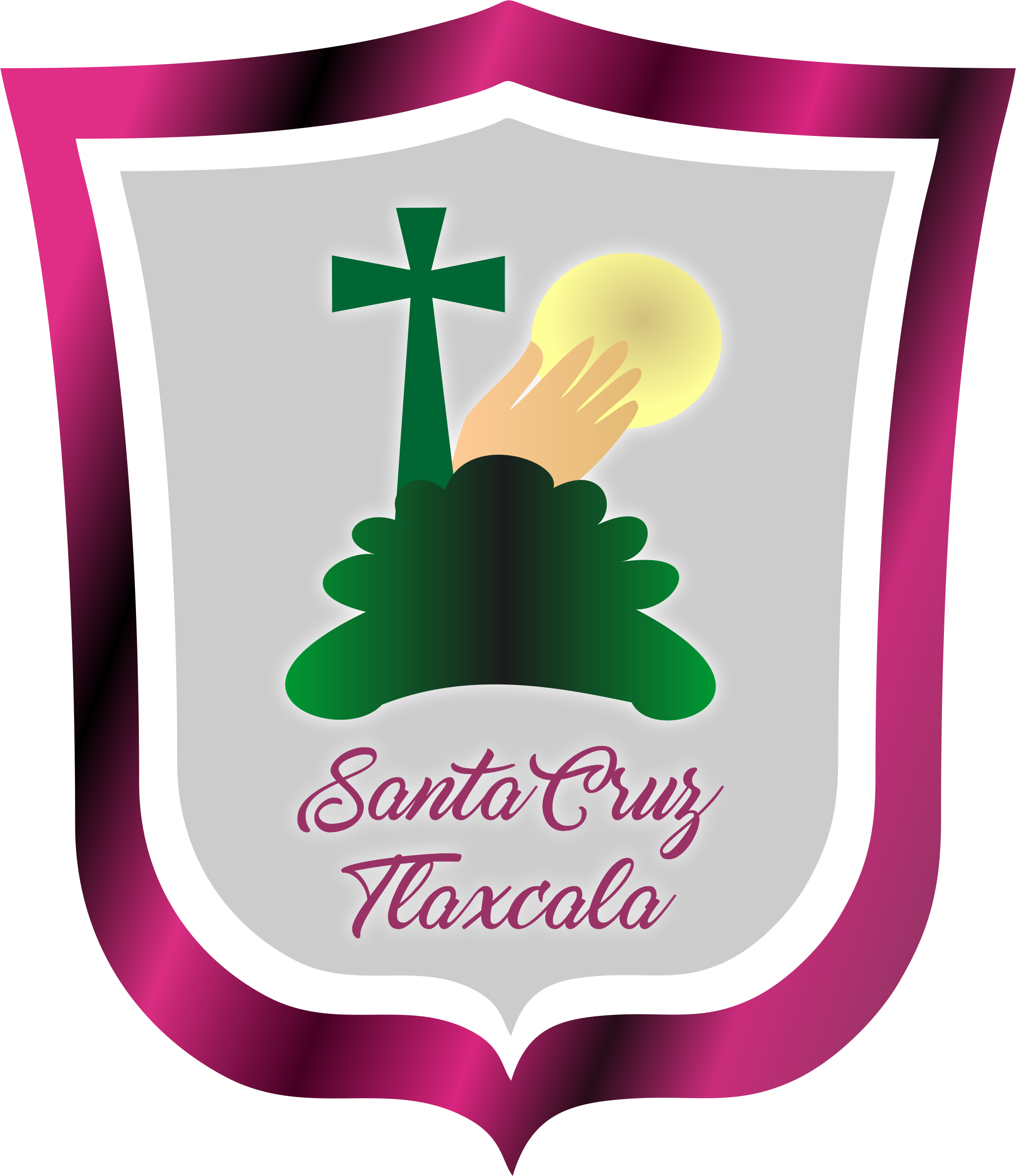 Escudo del municipio de Santa Cruz Tlaxcala actual